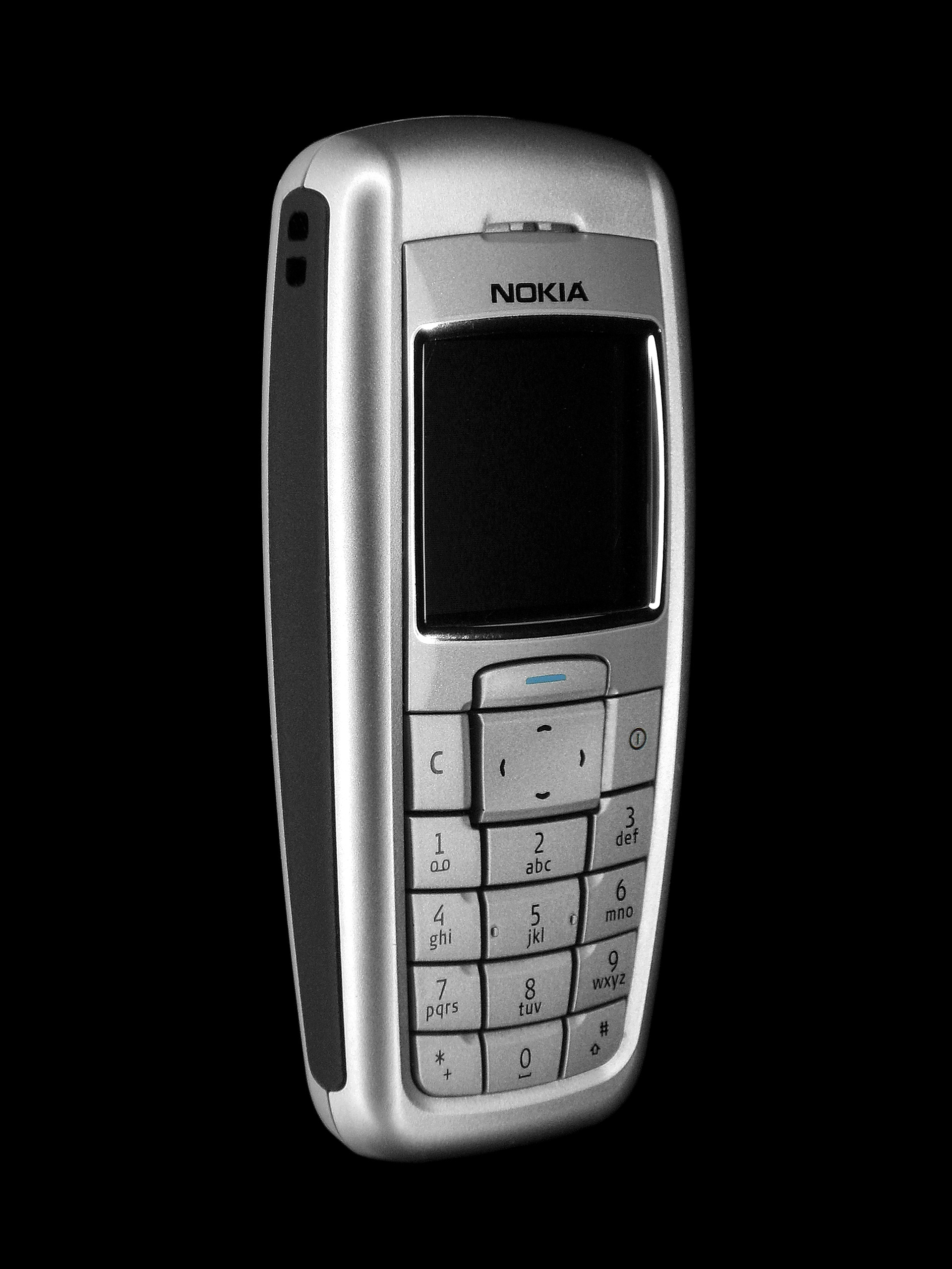 Teléfono Nokia 2600.